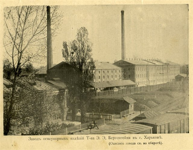 Харьков. Завод огнеупорных изделий Товарищества Э.Э. Бергенгейма. Ул. Кузинская, 3 (современная улицо Революции 1905 года). Открытка